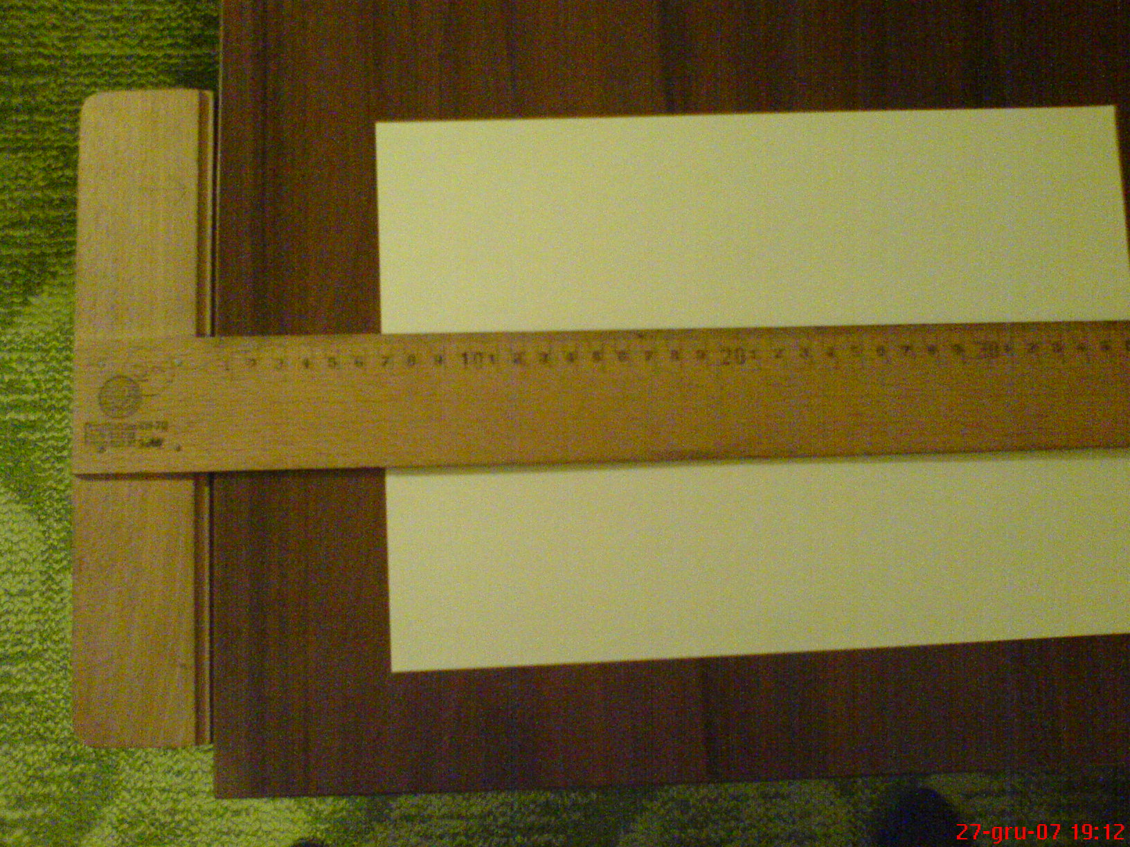 przykładnica, t-square, рейсшина, Reißschiene